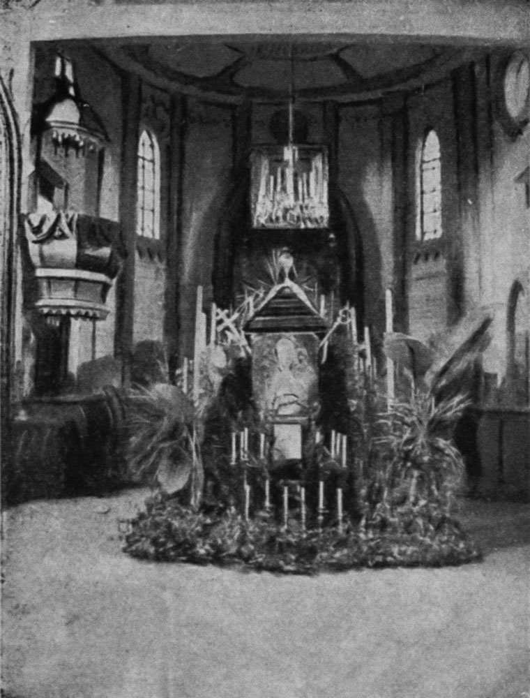 Беларуская (тарашкевіца): Росіца (Rosica). Касьцёл, інтэр'ер